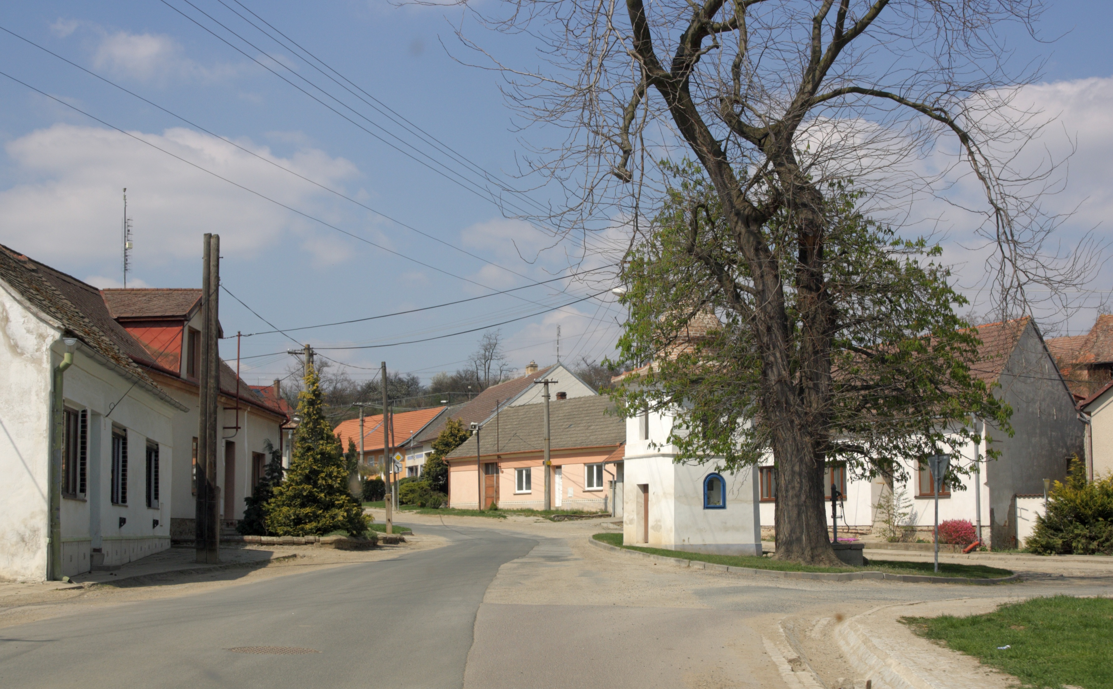 Jezeřany-Maršovice - náves v Maršovicích.